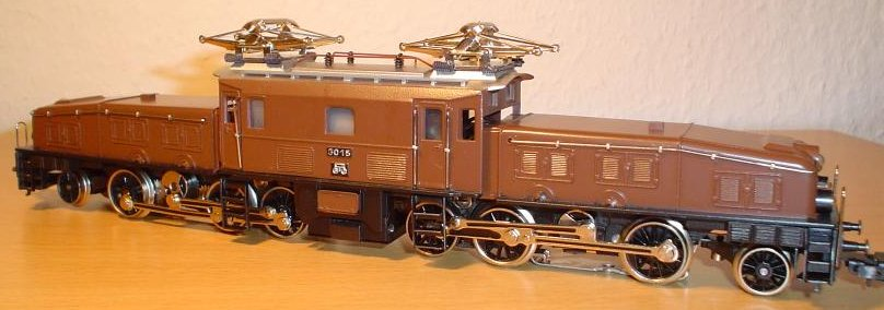 Märklin Krokodil 30159